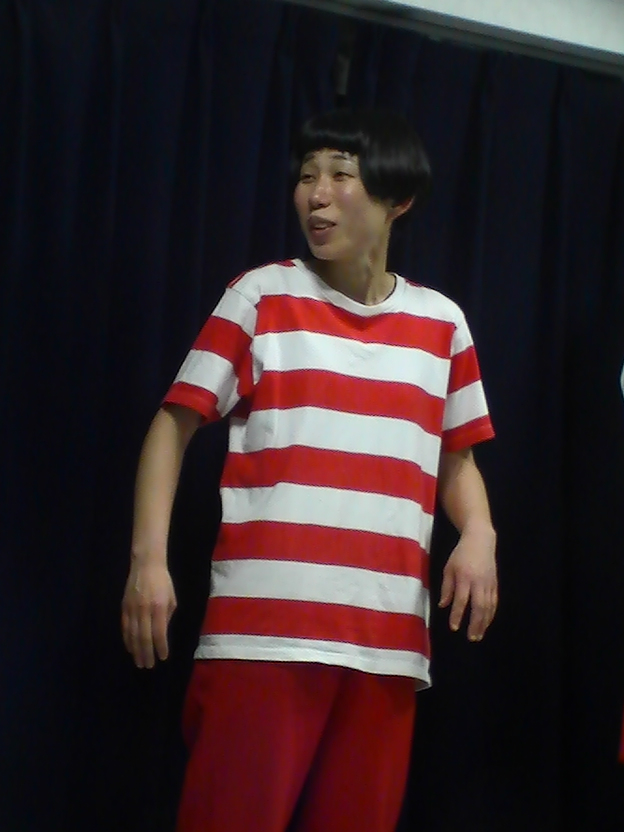 牧野ステテコ (2016年2月)